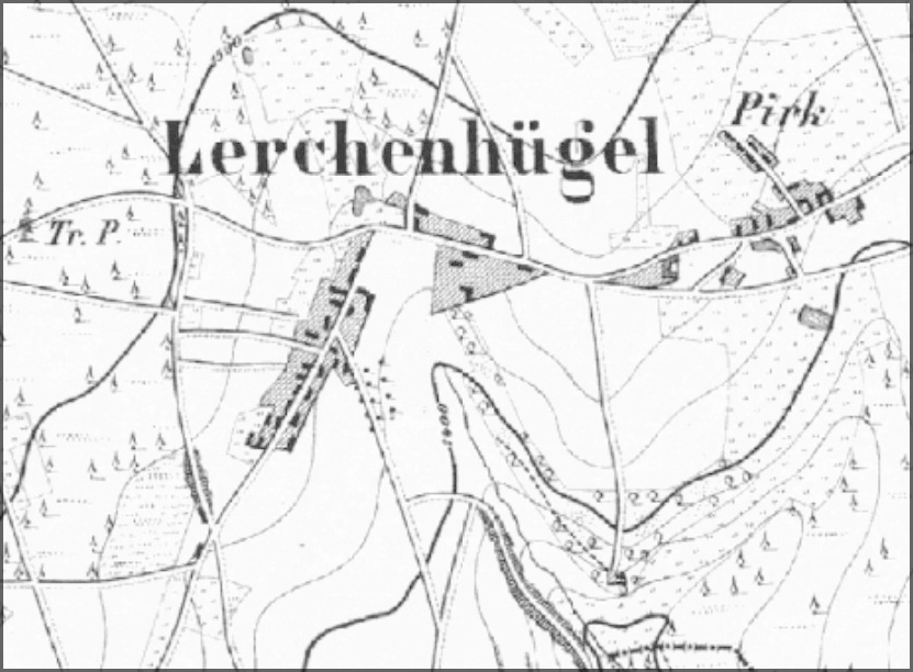 Historische Karte von 1873 des Ortes Birkenhügel - der aus den historischen Orten Lerchenhügel und Pirk hervorging.